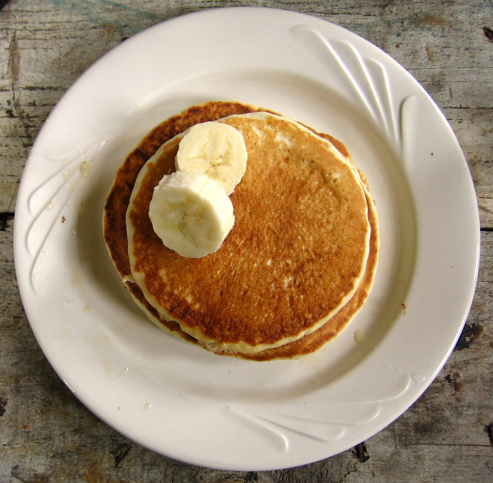 Banana on Pancake